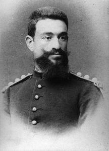 Маврудис Героянис